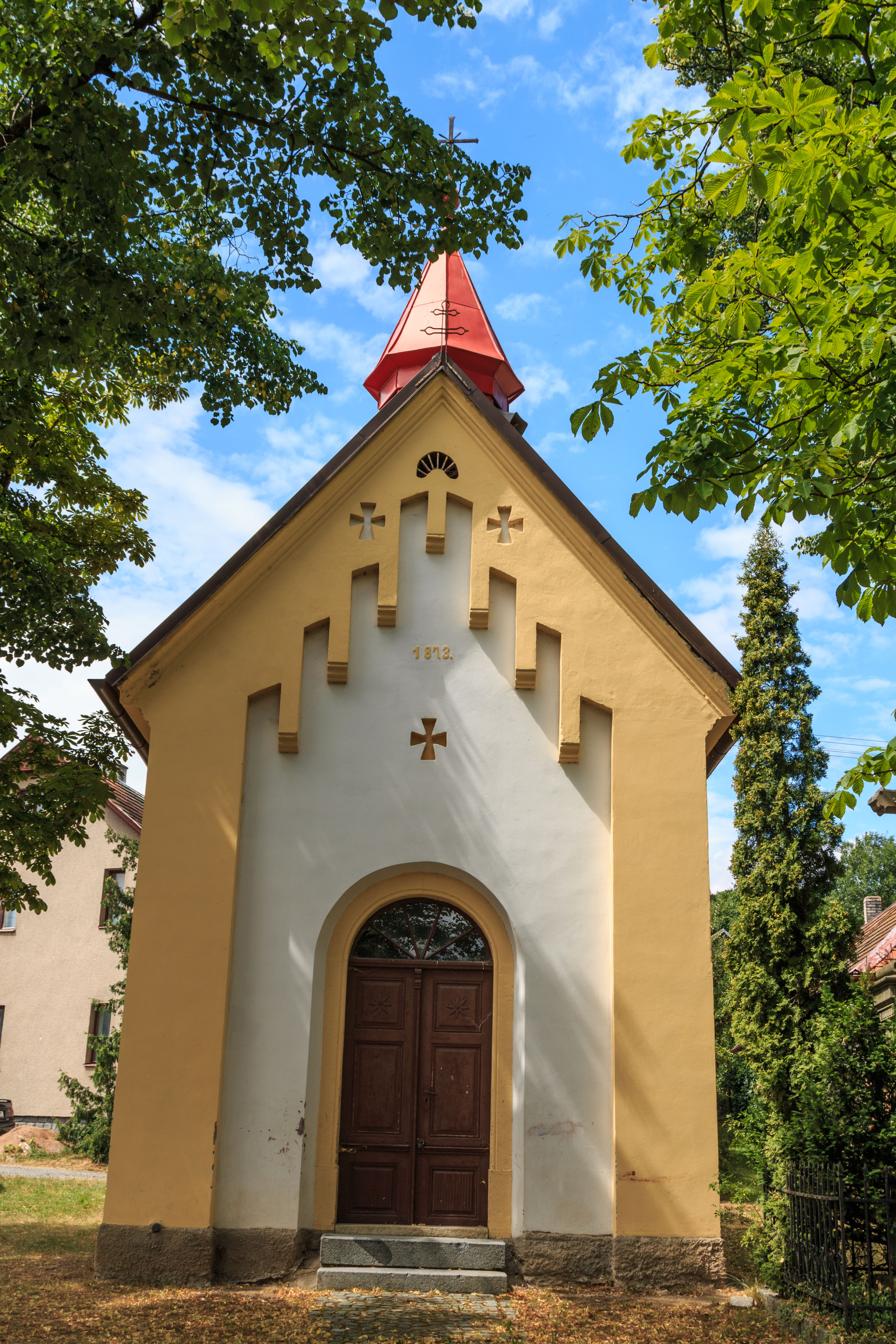 Skutíčko kaplička